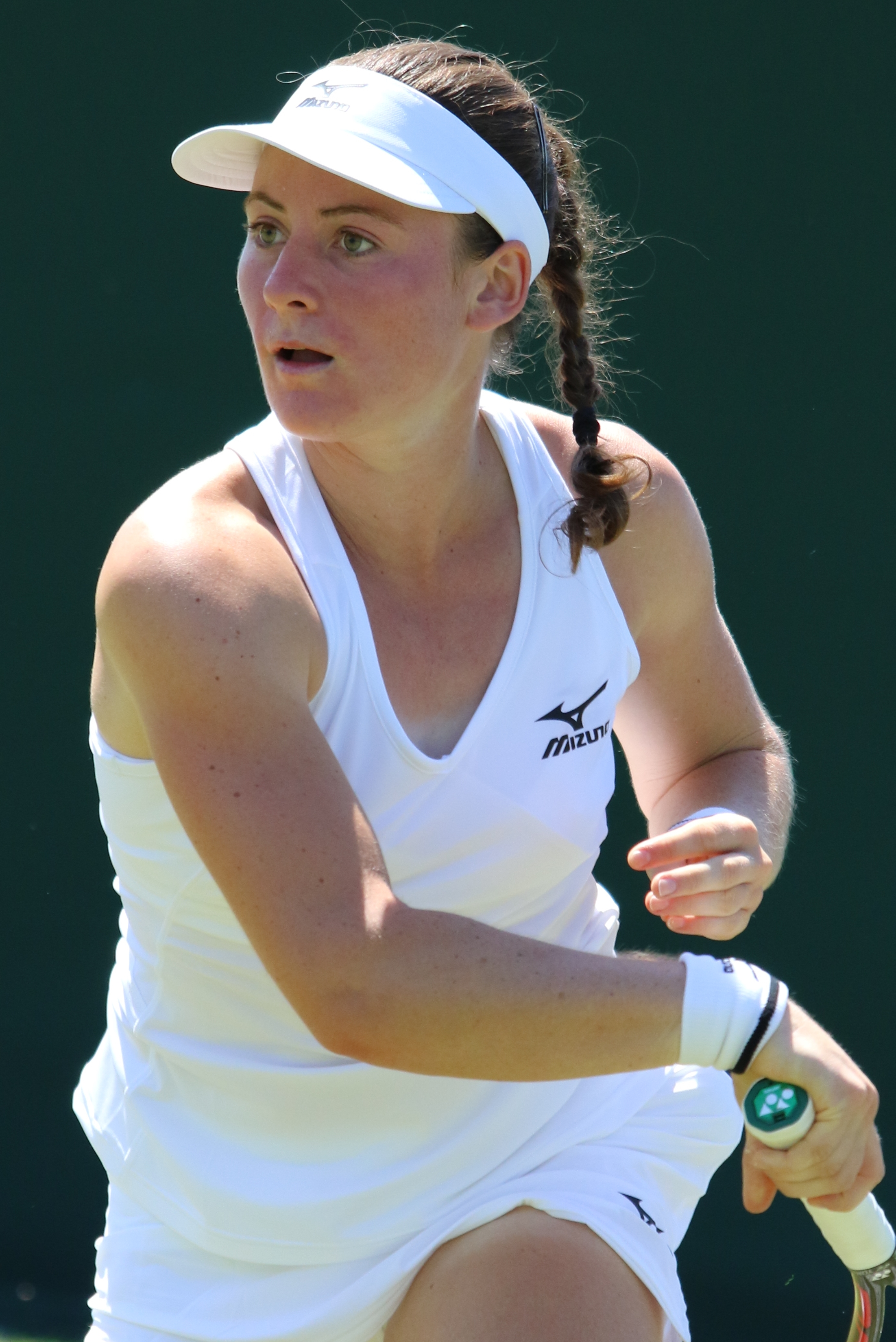 Zidansek WMQ18 (19)